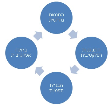 תרשים זרימה המתאר את מעגל הלמידה